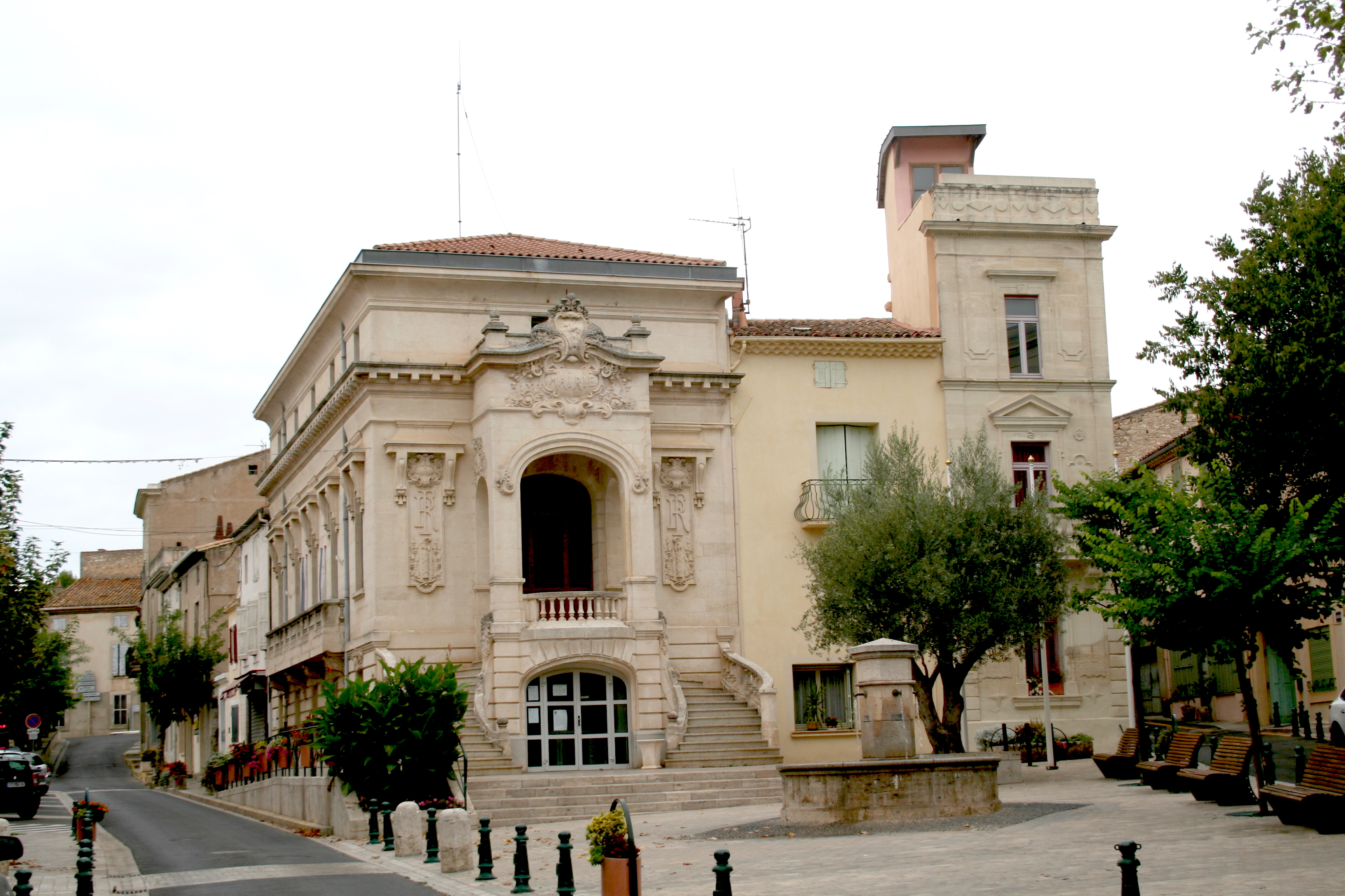 Nissan-lez-Enserune (Hérault) - mairie